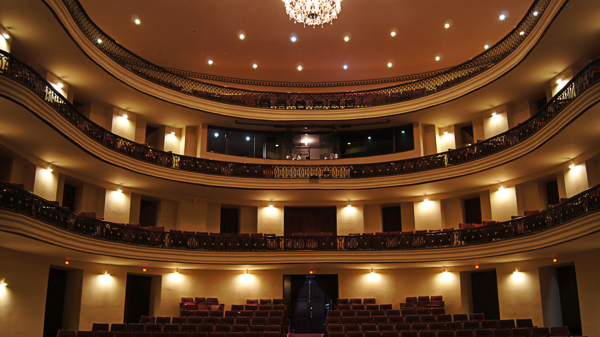 Teatro Ignacio de la Llave del centro histórico de la ciudad de Orizaba, Veracruz.